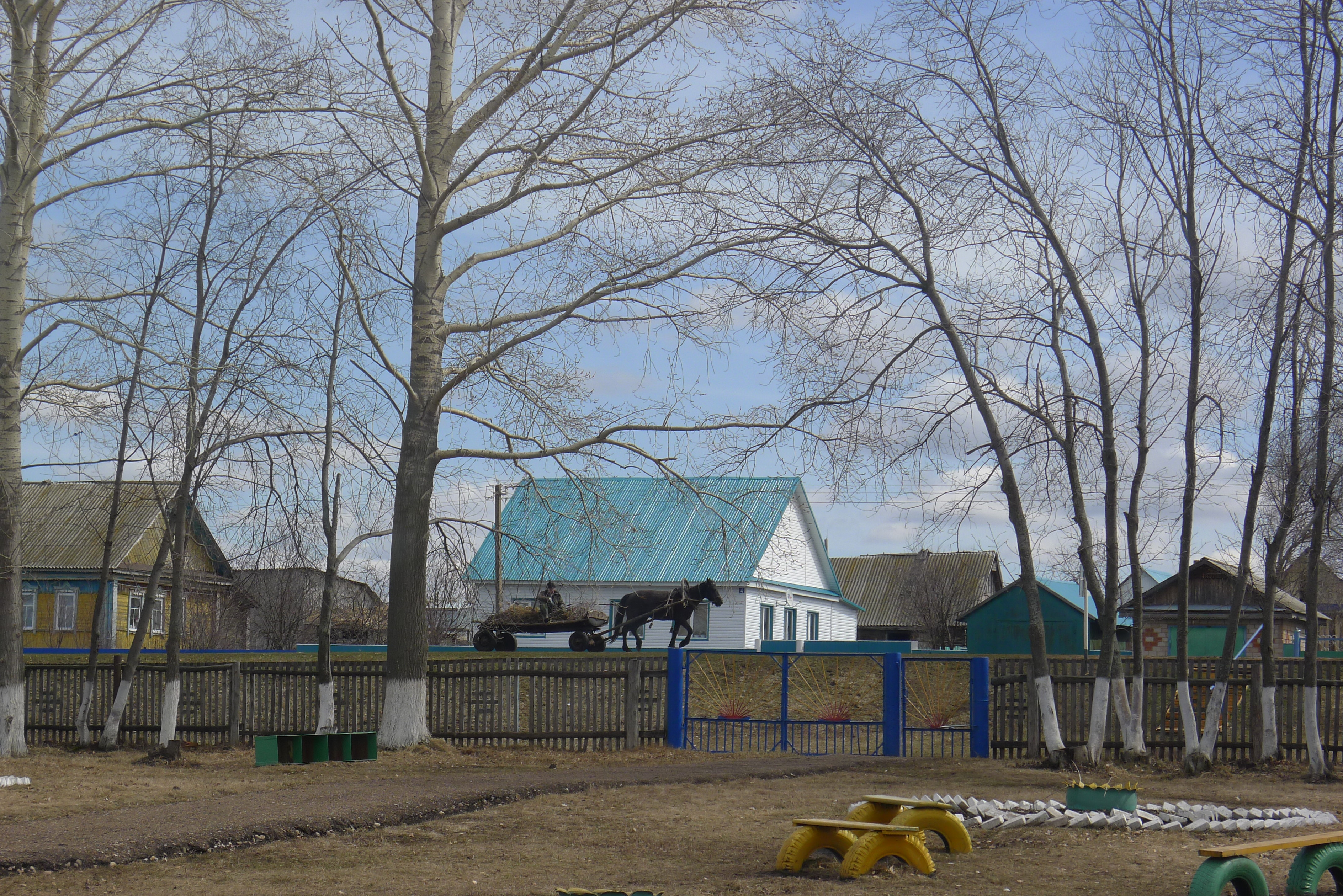 Поездка викимедистов Рустама Нурыева (Уфа), Амира Ахарони (Иерусалим) и Николая Павлова (Якутск) в деревню Старобабичево